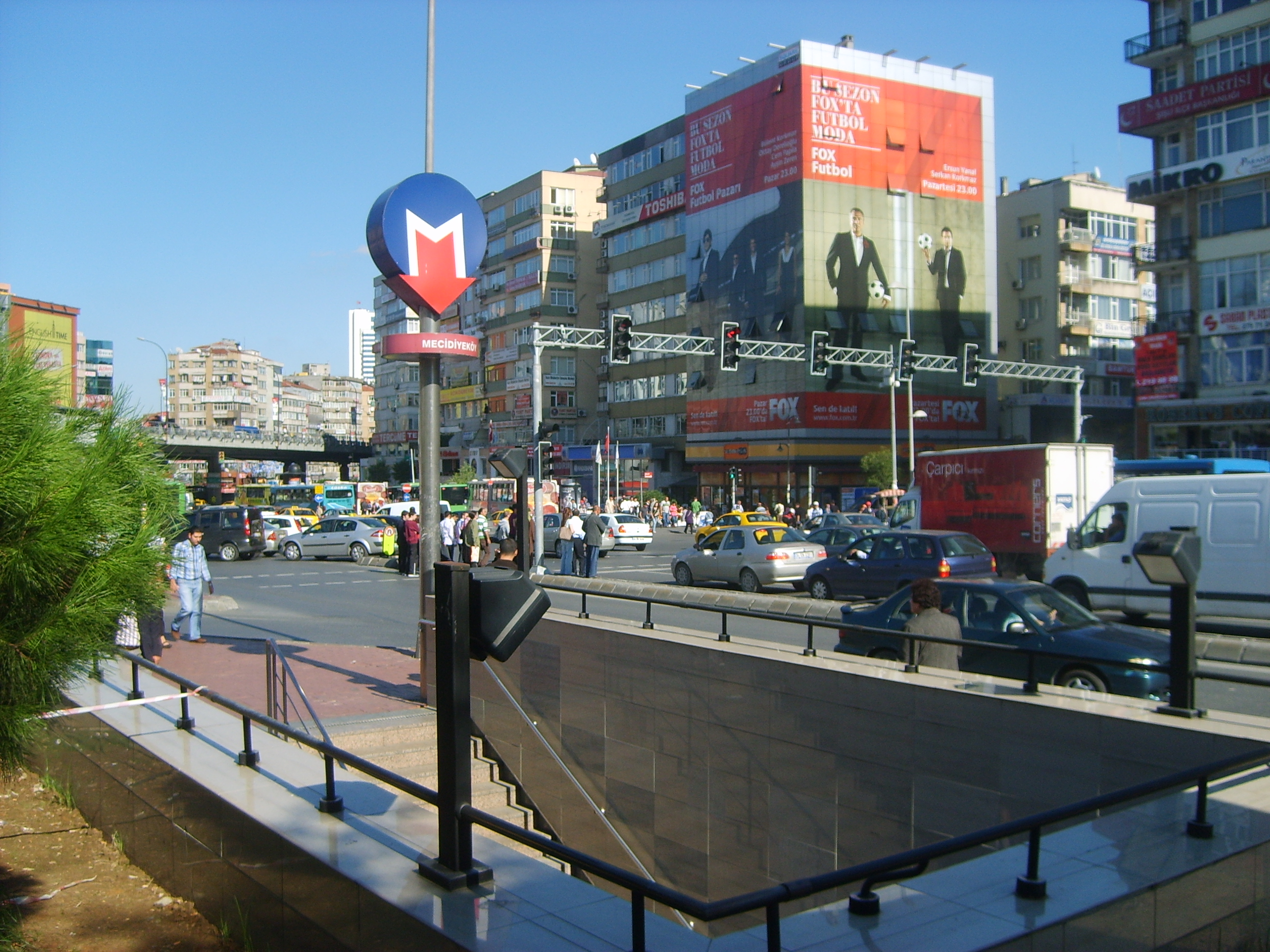 Istanbul Metrosu Şişli istasyonu Mecidiyeköy girişi